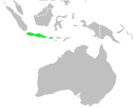 areale della specie